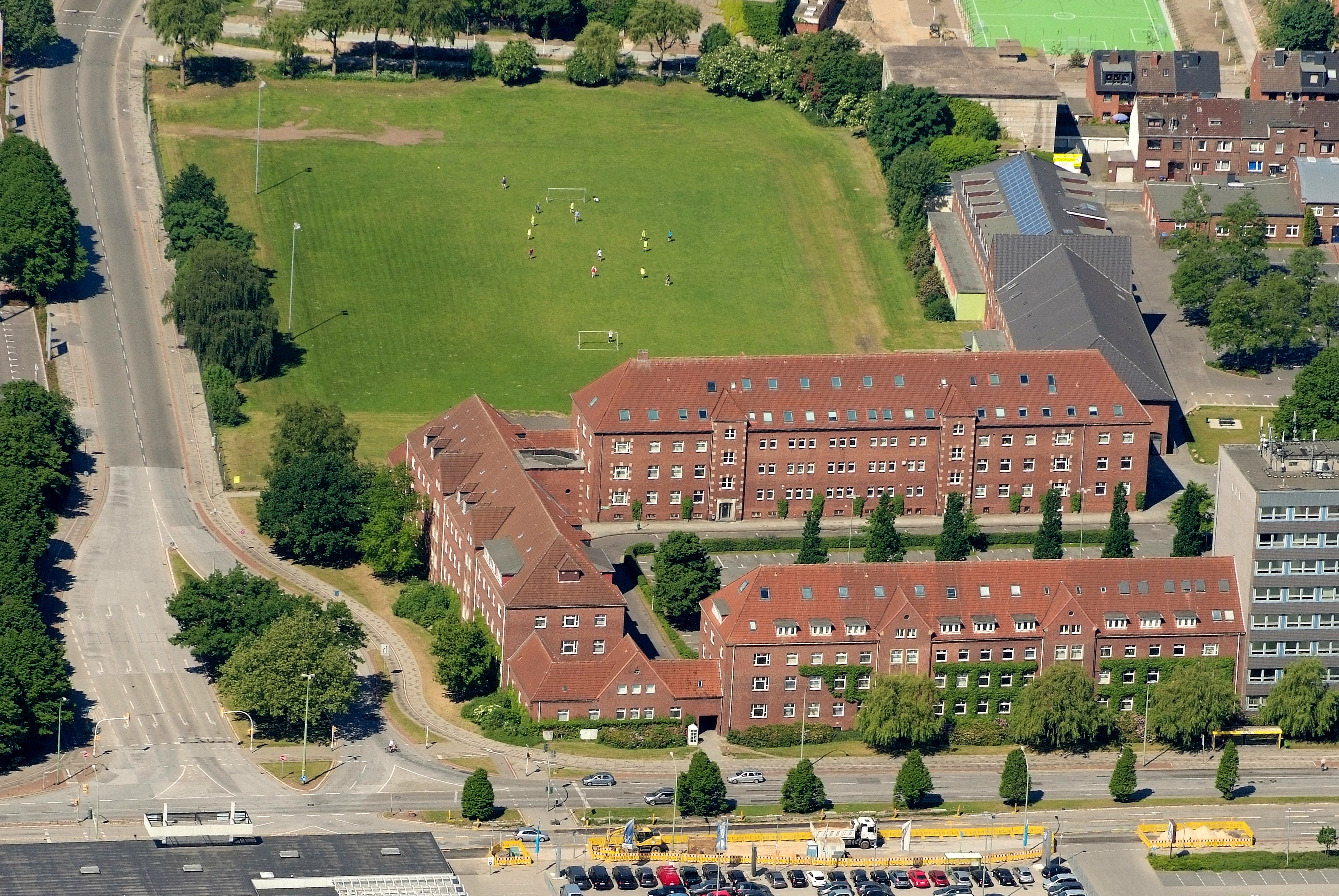 Stadtverwaltung Bremerhaven. Fotoflug vom Flugplatz Nordholz-Spieka über Cuxhaven und Wilhelmshaven